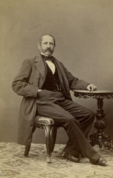 Överstelöjtnant Claes Grill. Från 1867 godsägare av Godegård säteri.